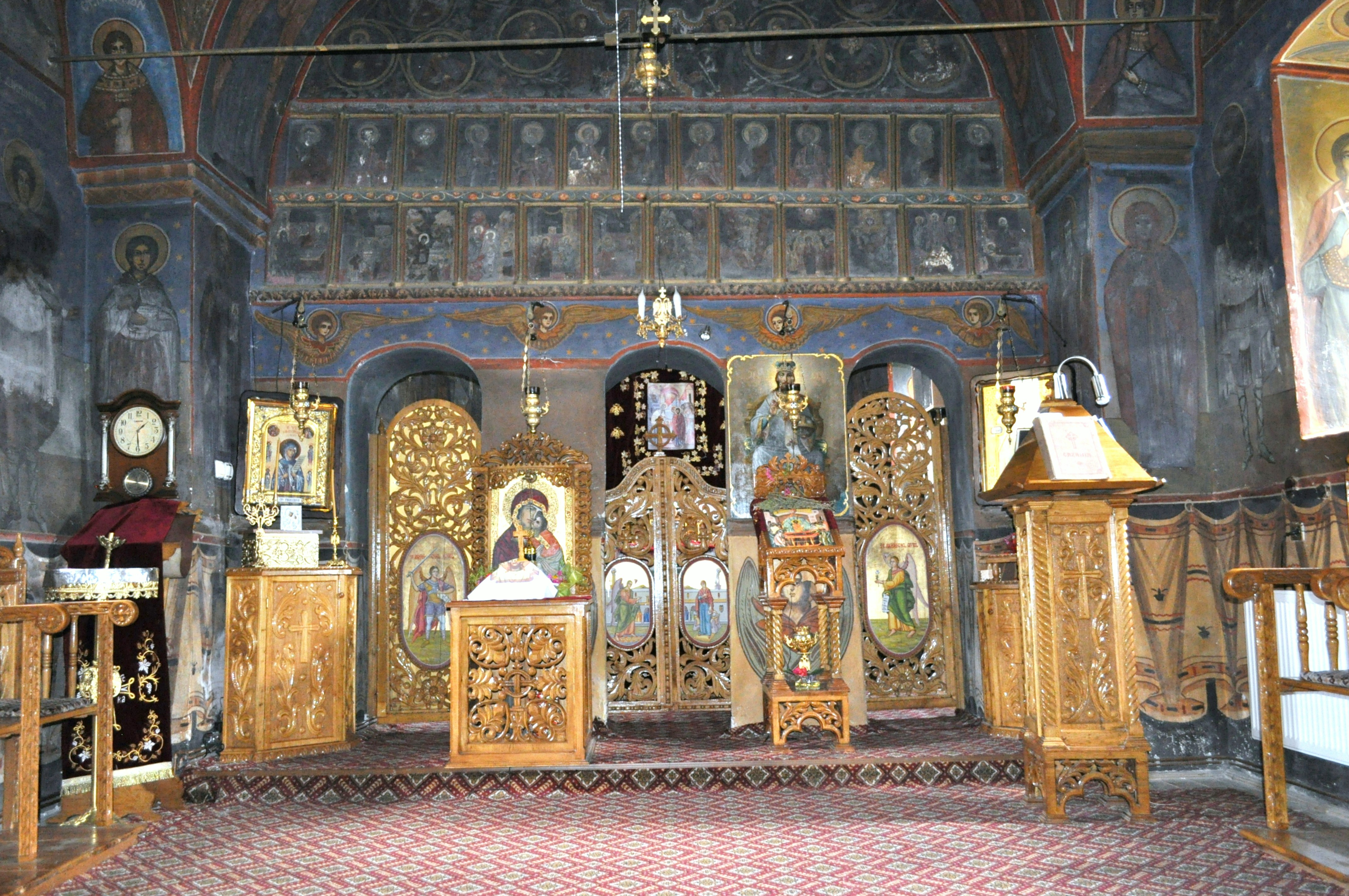 Biserica "Intrarea în Biserică"-Brad-Bătușari, municipiul Curtea de Argeș, Str. Vlaicu Vodă 8